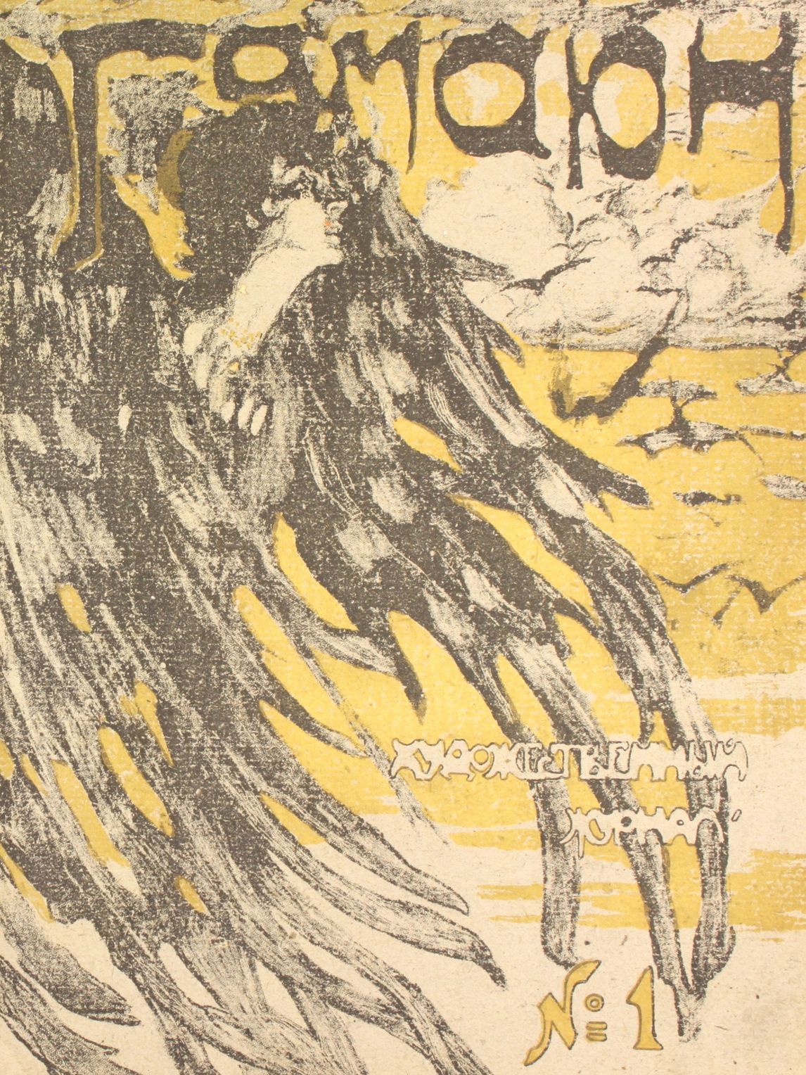 Гамаюн : Художественный журнал / Под ред. А. Н. Златовратского. - СПб., 1906. - № 1. Обложка (и иллюстрация к стихотворению)